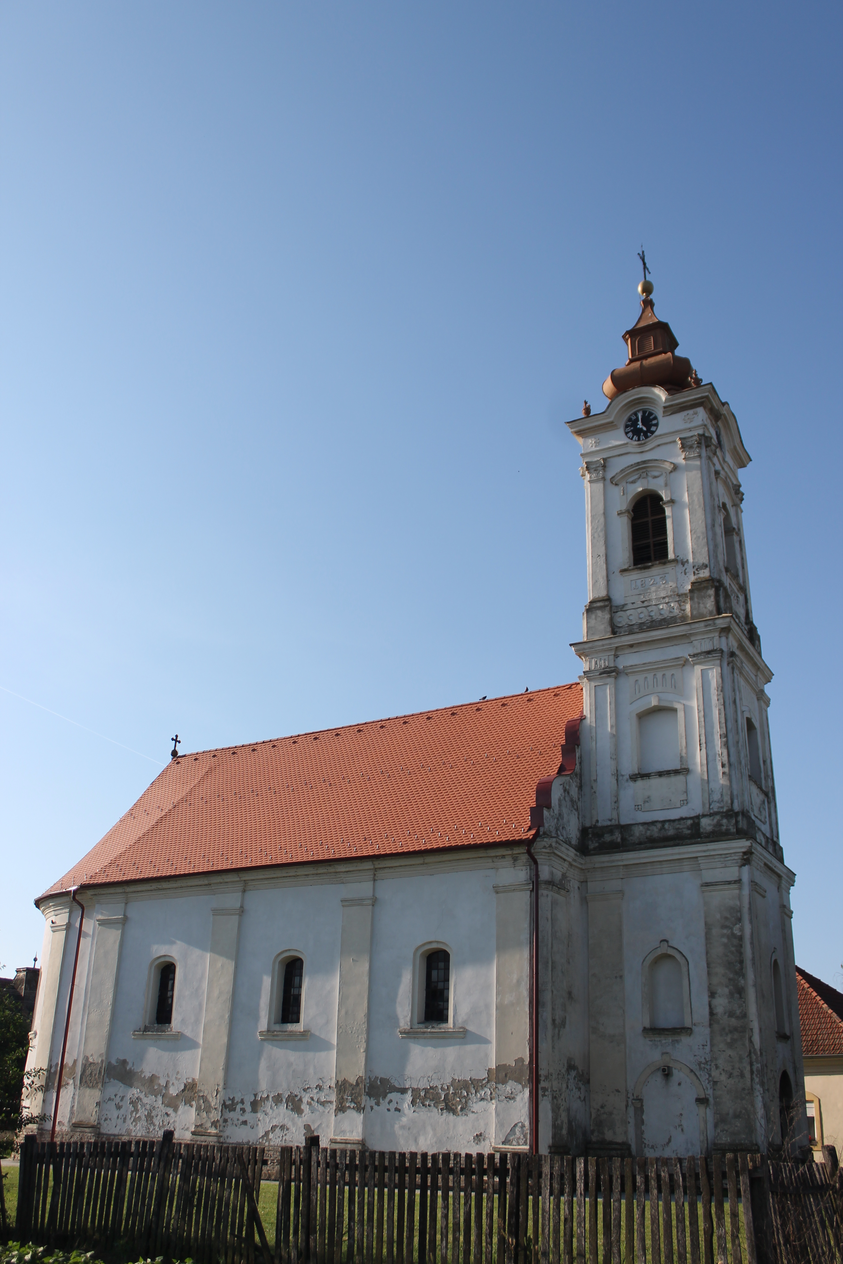 Platičevo, crkva Sv. Gavrila